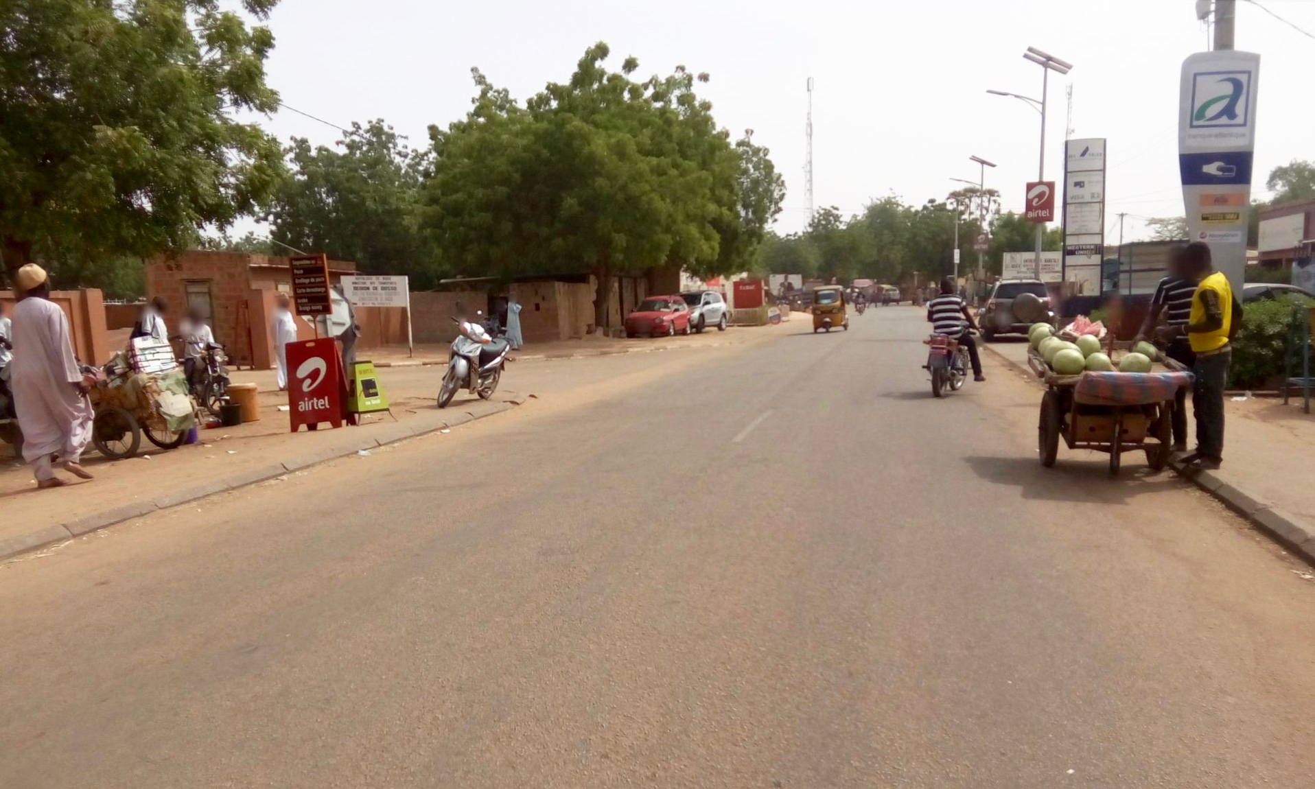 Nationalstraße 1 in der Stadt Dosso, Niger.